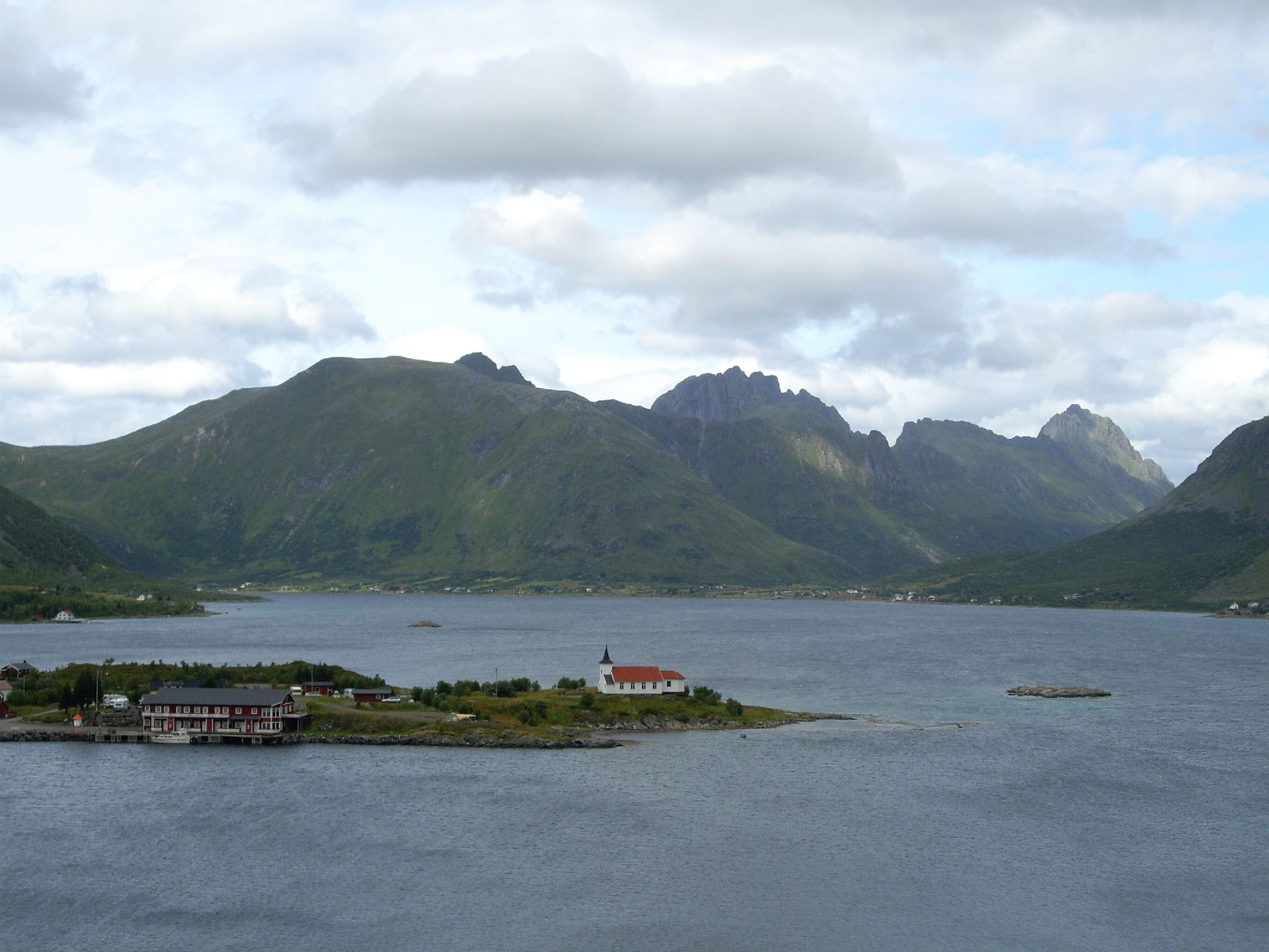 Sildpollnes kapell